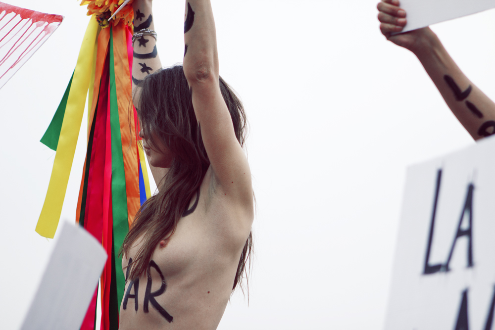 31 mars 2012